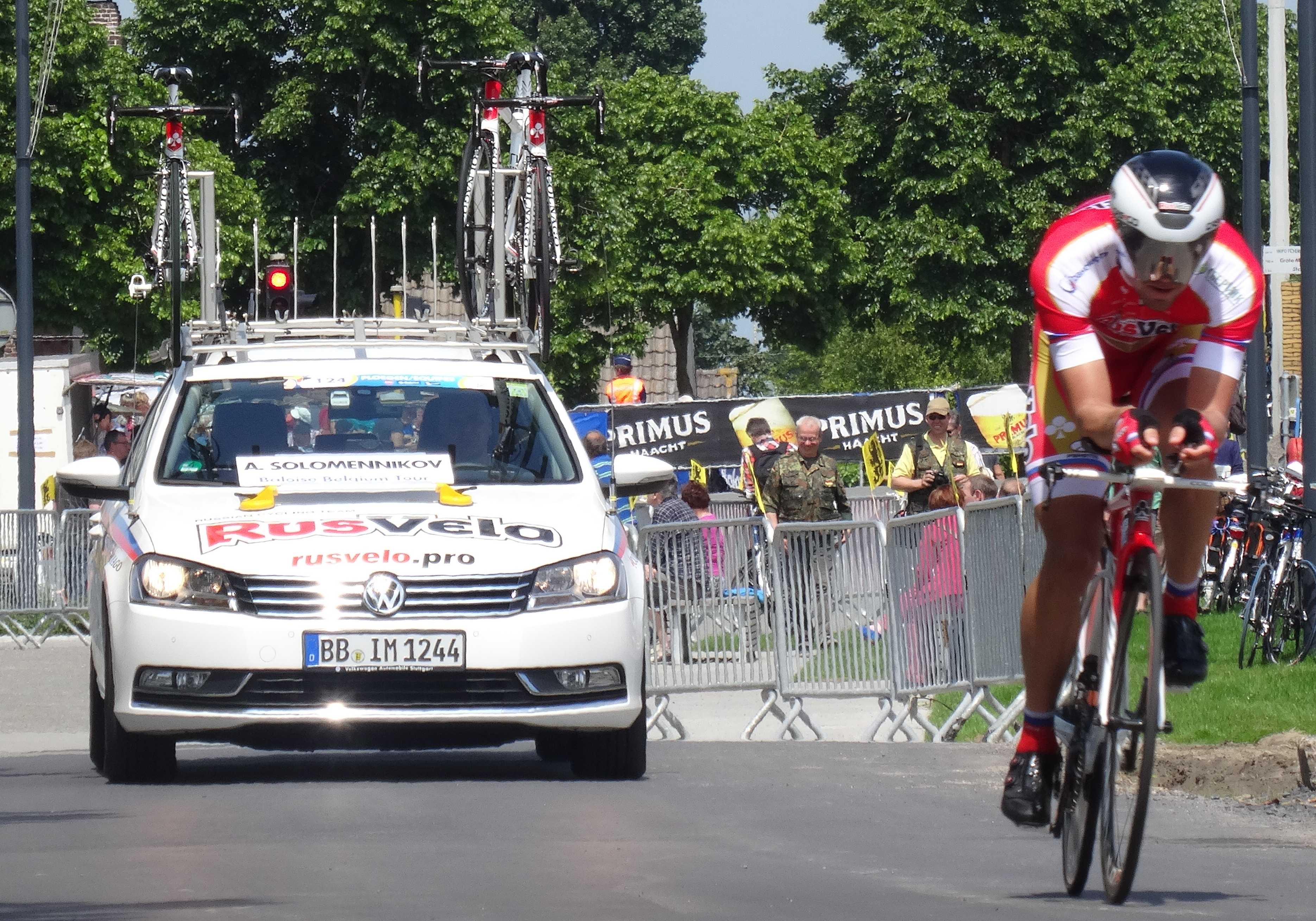 Reportage photographique réalisé le vendredi 30 mai à l'occasion du contre-la-montre individuel de la troisième étape du Tour de Belgique 2014 à Dixmude, Belgique.